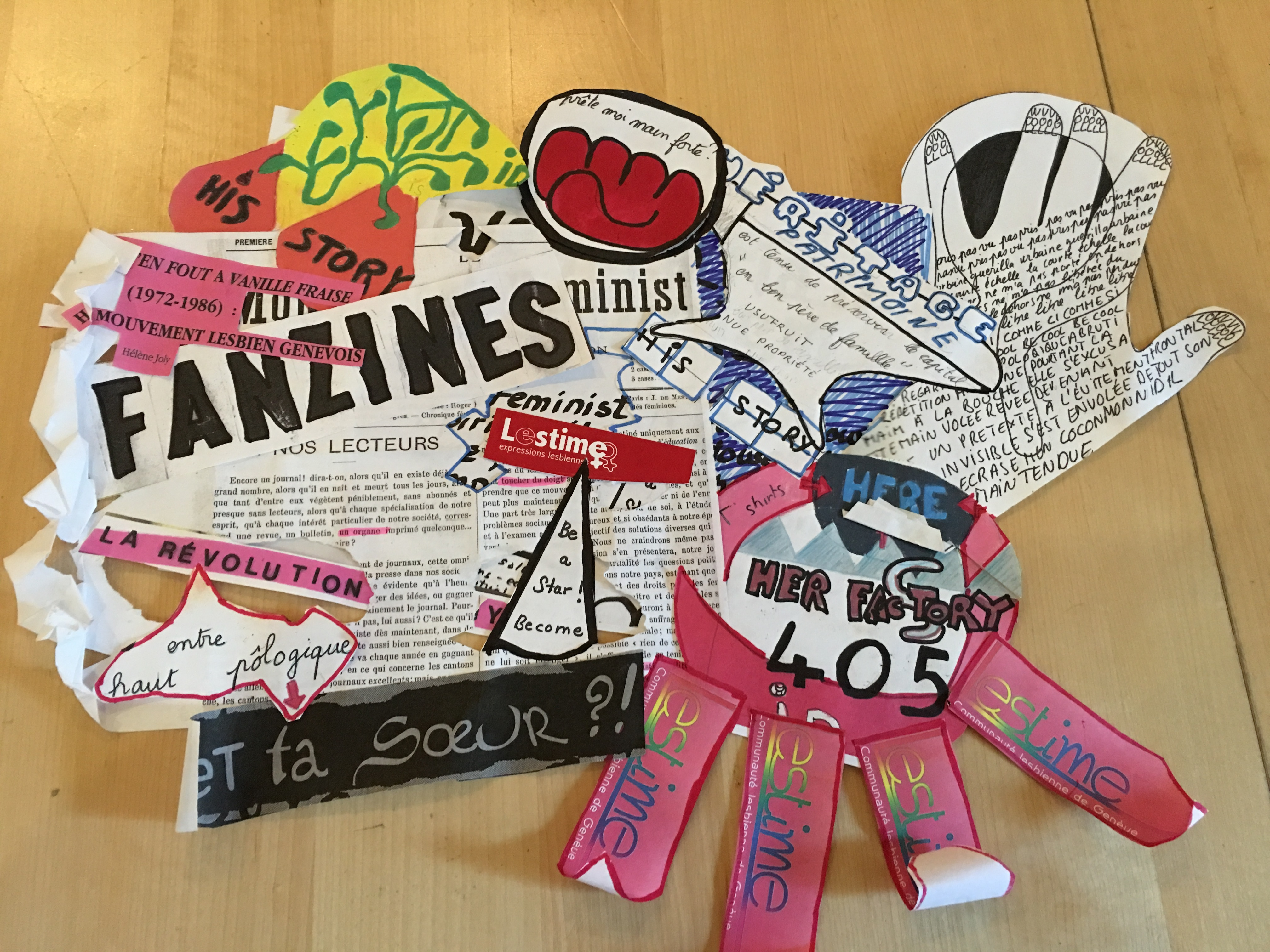 oeuvre de Natacha Rault pour les 15 ans de l'association Lestime